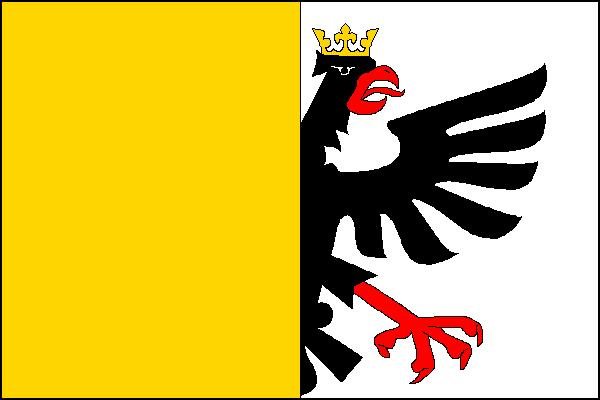 Vlajka obce Velké Opatovice